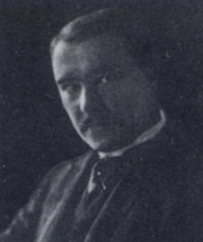 Foto von Friedrich Hegenscheidt